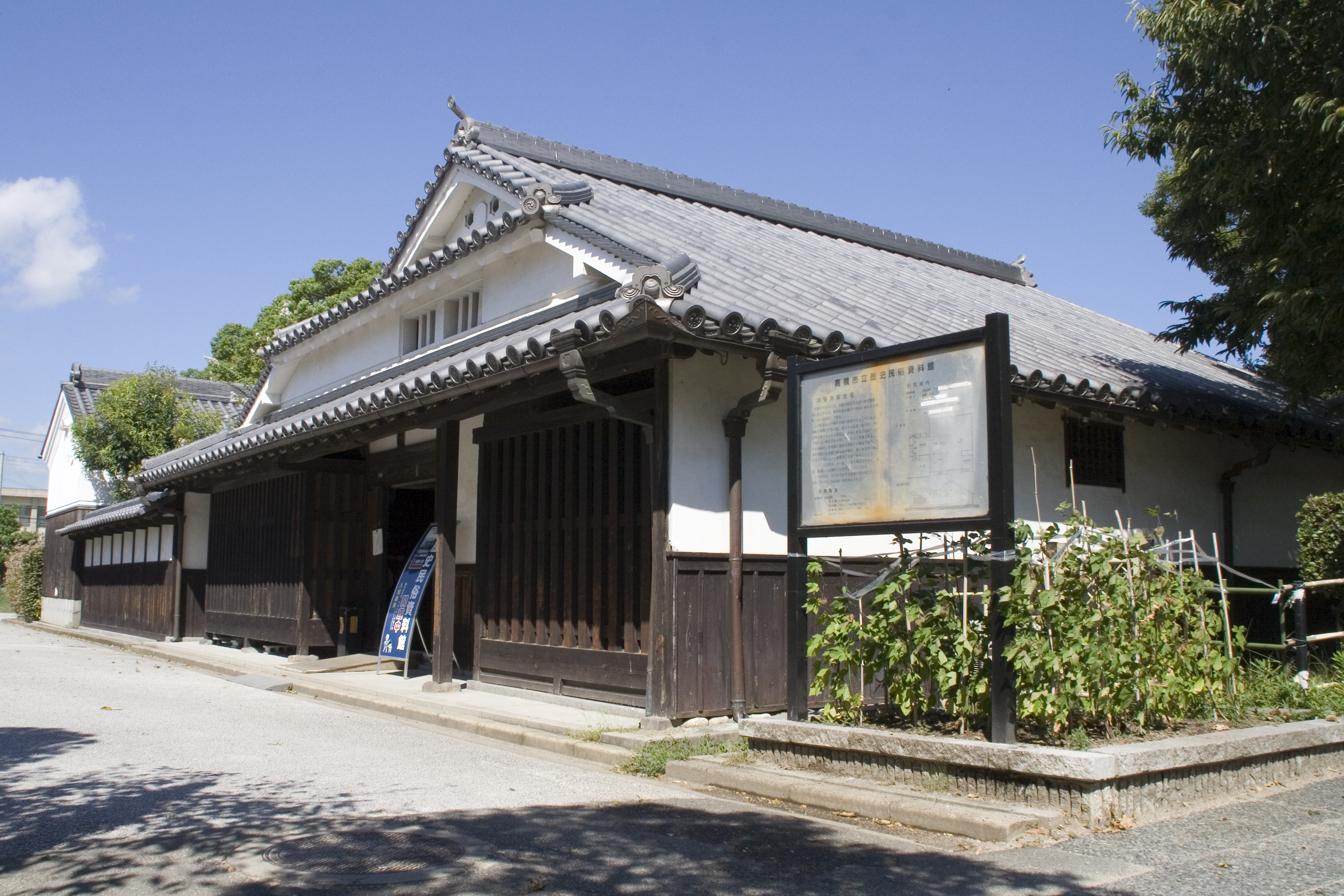 高槻市立歴史民俗資料館